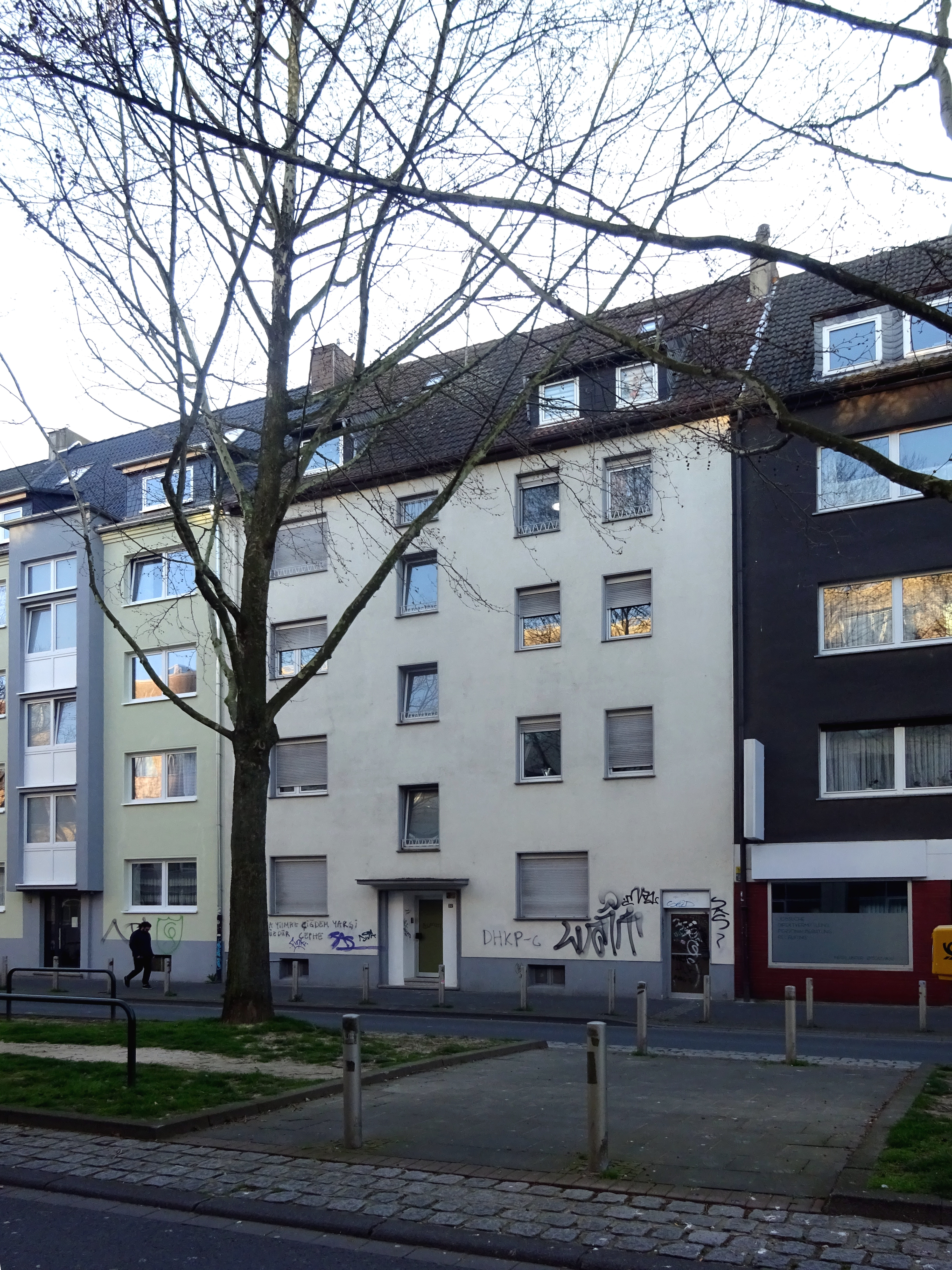 Haus Kurfürstenstr. 32 in Dortmund